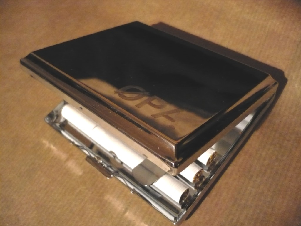 Opa's cigarette case